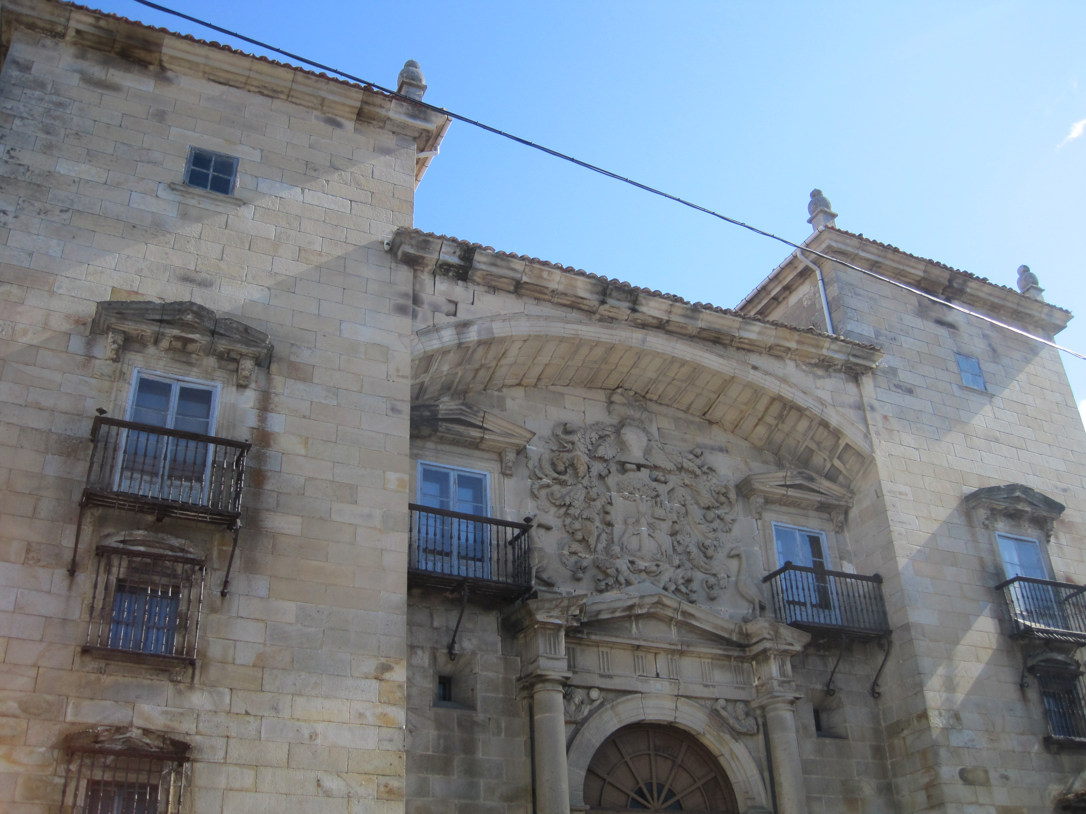 Vista externa del Palacio de Chiloeches, colindante con la plaza del ayuntamiento.